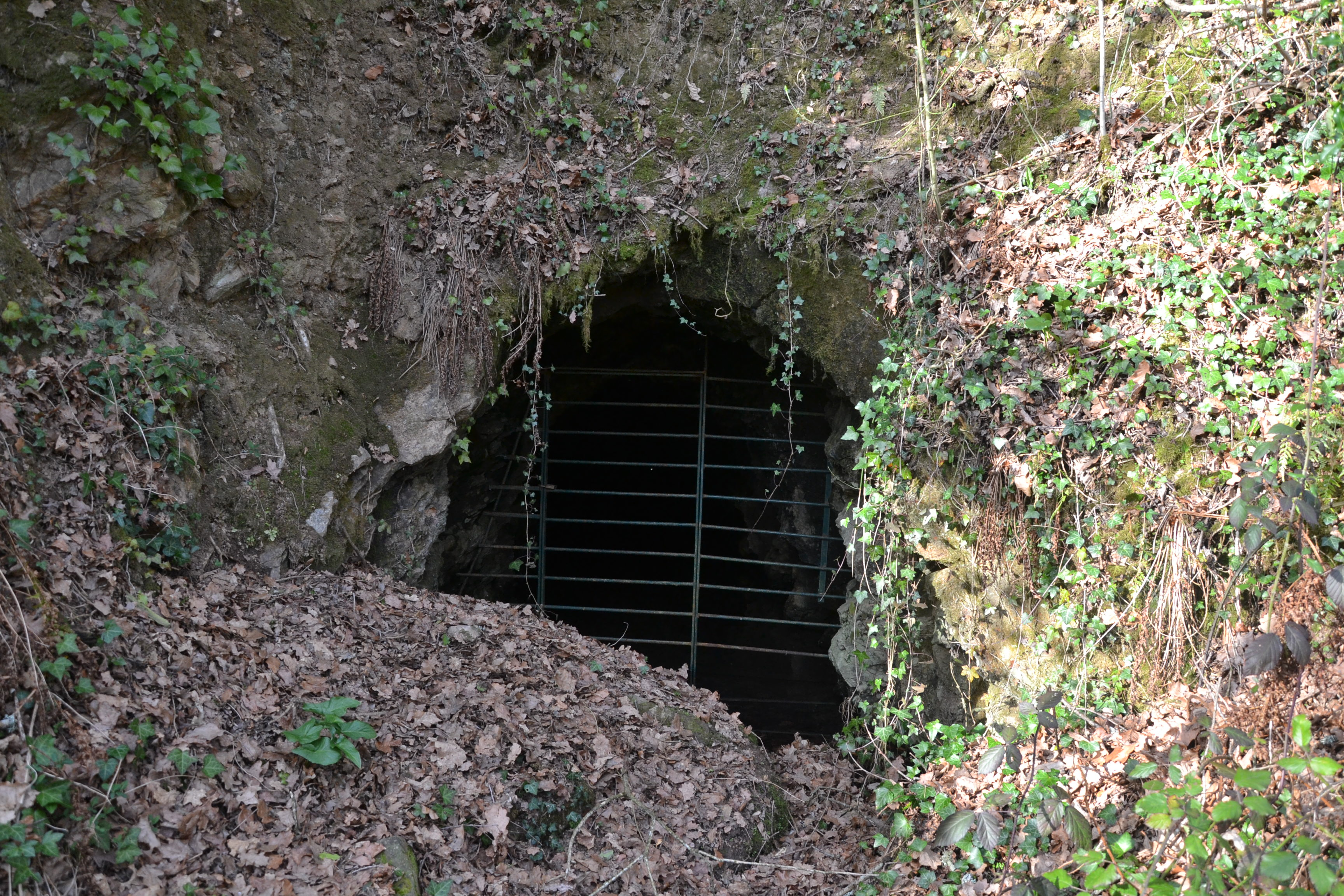 Entrée d'ancienne mine de barytine au Moulin de Roche, commune de Rancon (Haute-Vienne, France).